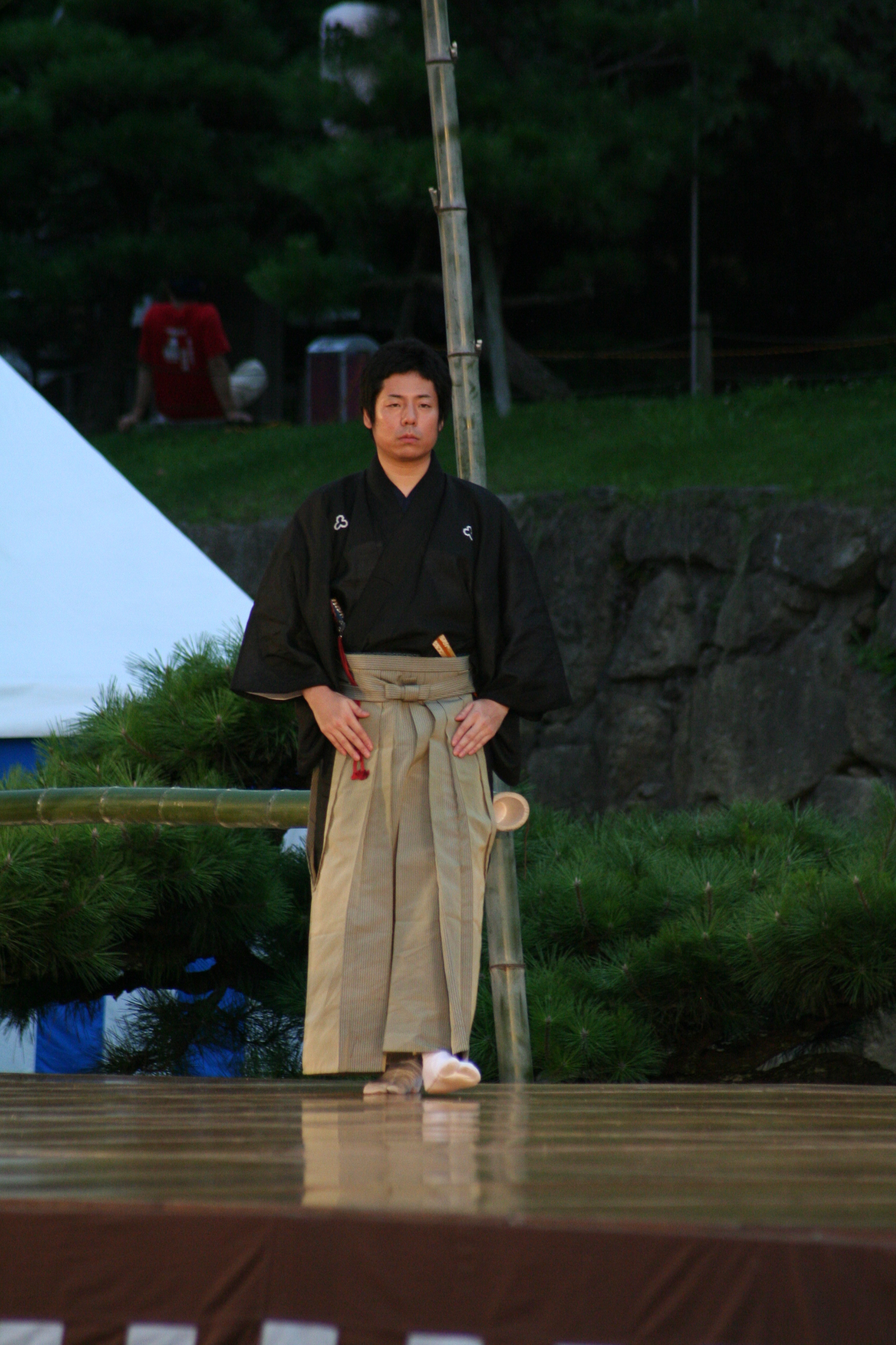 2009年7月31日に姫路城三の丸広場で行なわれた姫路薪能の様子。